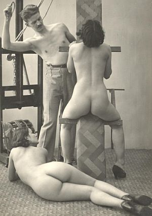 Biederer photo